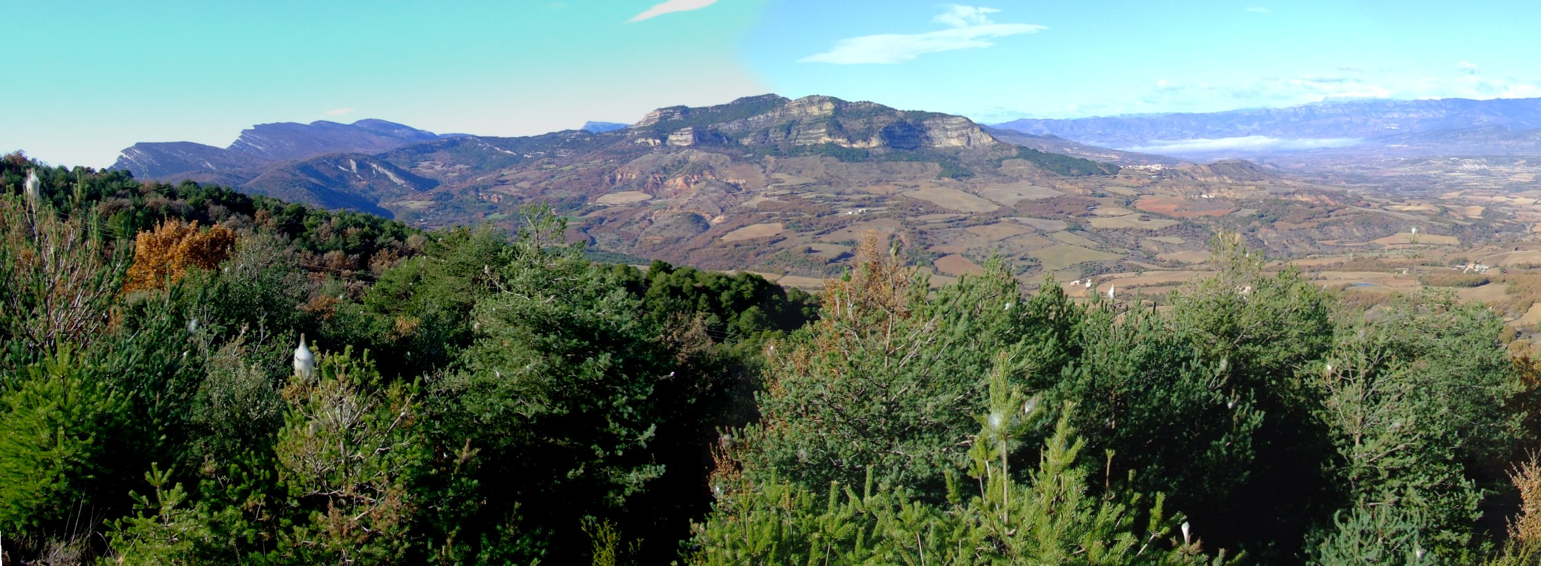 L'antic terme de Sant Salvador de Toló (Gavet de la Conca, Pallars Jussà)